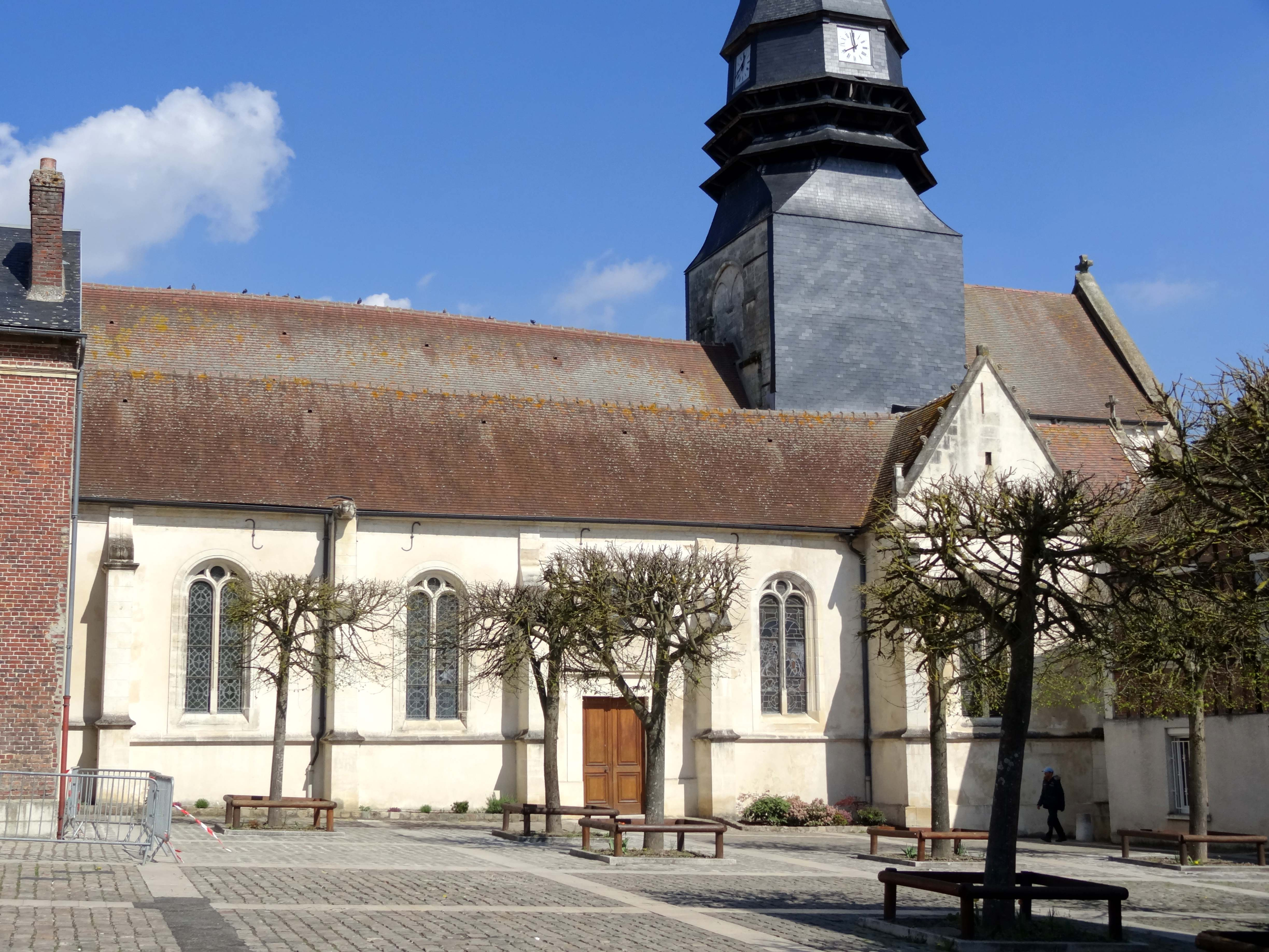 Église Saint-Lucien de Méru - voir titre.